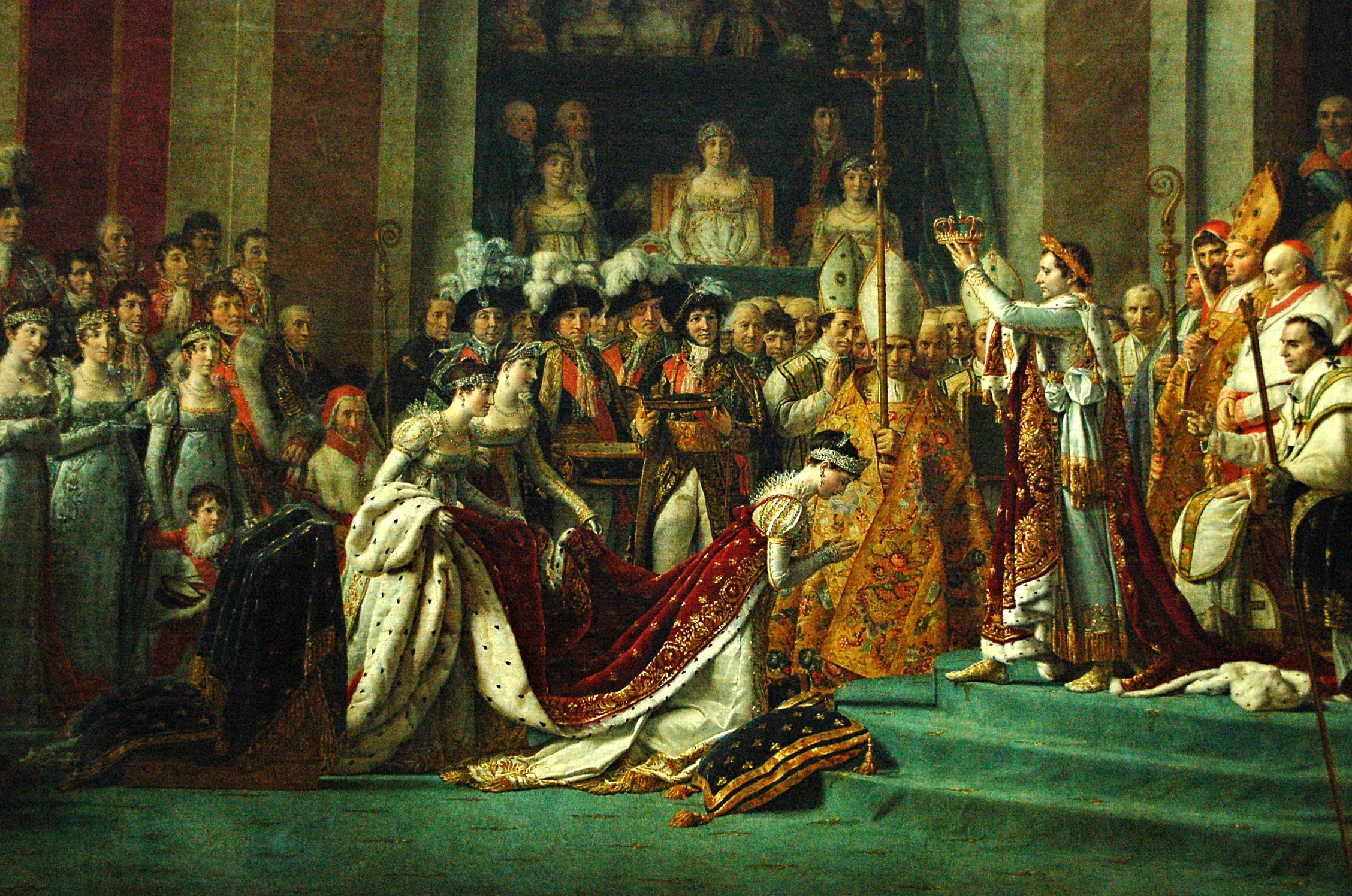 Musée du Louvre